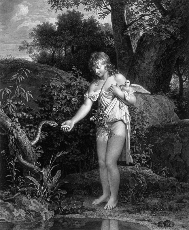 Gravure au burin de Bervic, 1798, d’après un tableau de Léonor Mérimée, L’innocence nourrissant un serpent (Salon de 1791) - Le tableau est détruit dans un incendie en 1871 lors de la Commune.